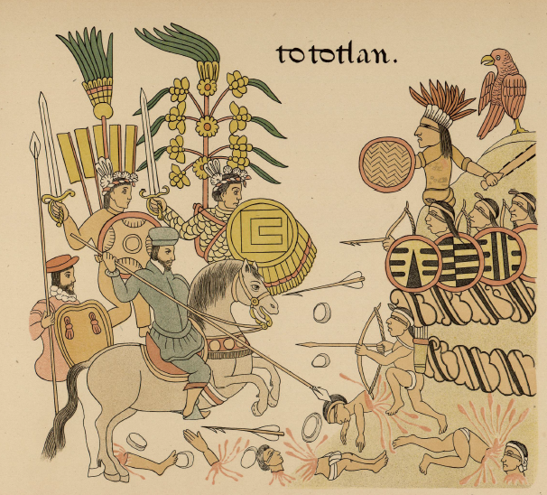 Fragmento del lienzo de tlaxcala.